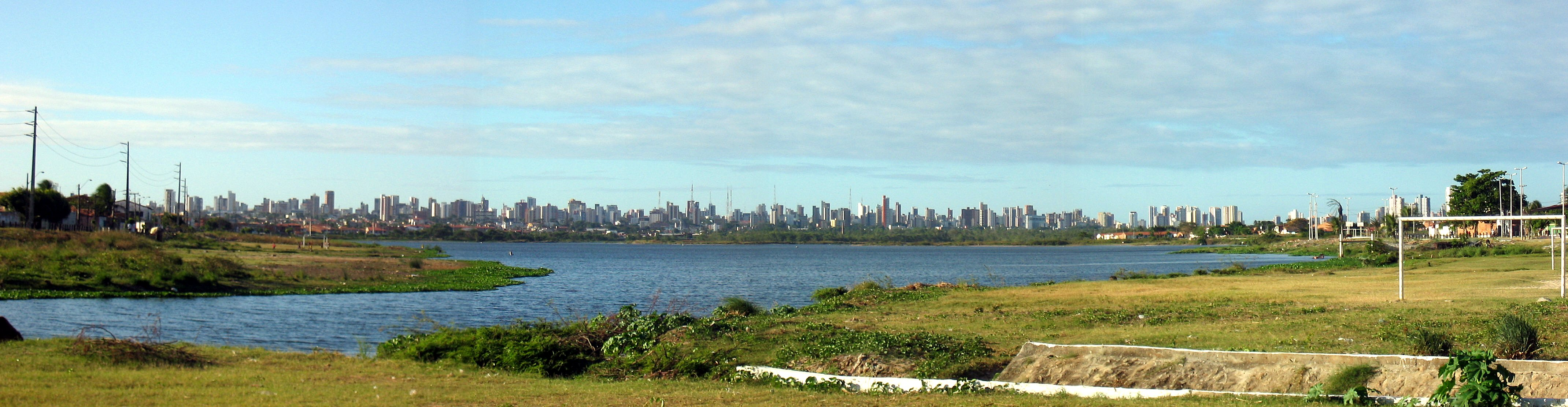 Panorama de Fortaleza do Cocó pela BR116